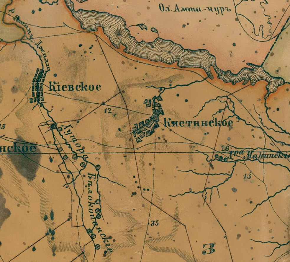 Сёла Киевское и Кистинское на «Карте Ставропольской губернии составленной при ставропольской губернской чертёжной по новым сведениям по указаниям и под непосредственным наблюдением ставропольского губернатора, генерал-майора Н. Е. Никифораки в 1896 году»